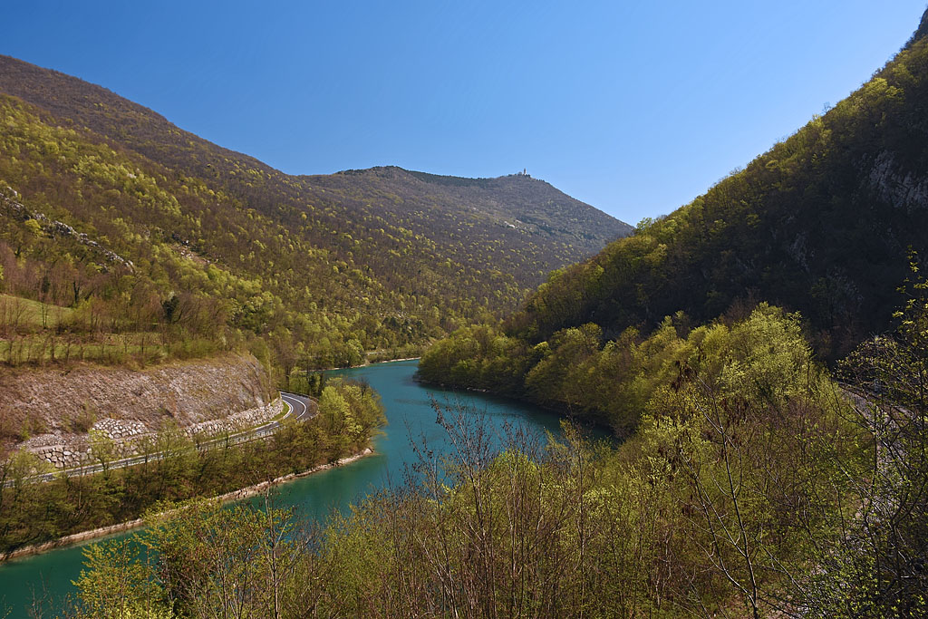 Soča med Sabotinom (desno) in Sveto goro (zadaj na sliki).